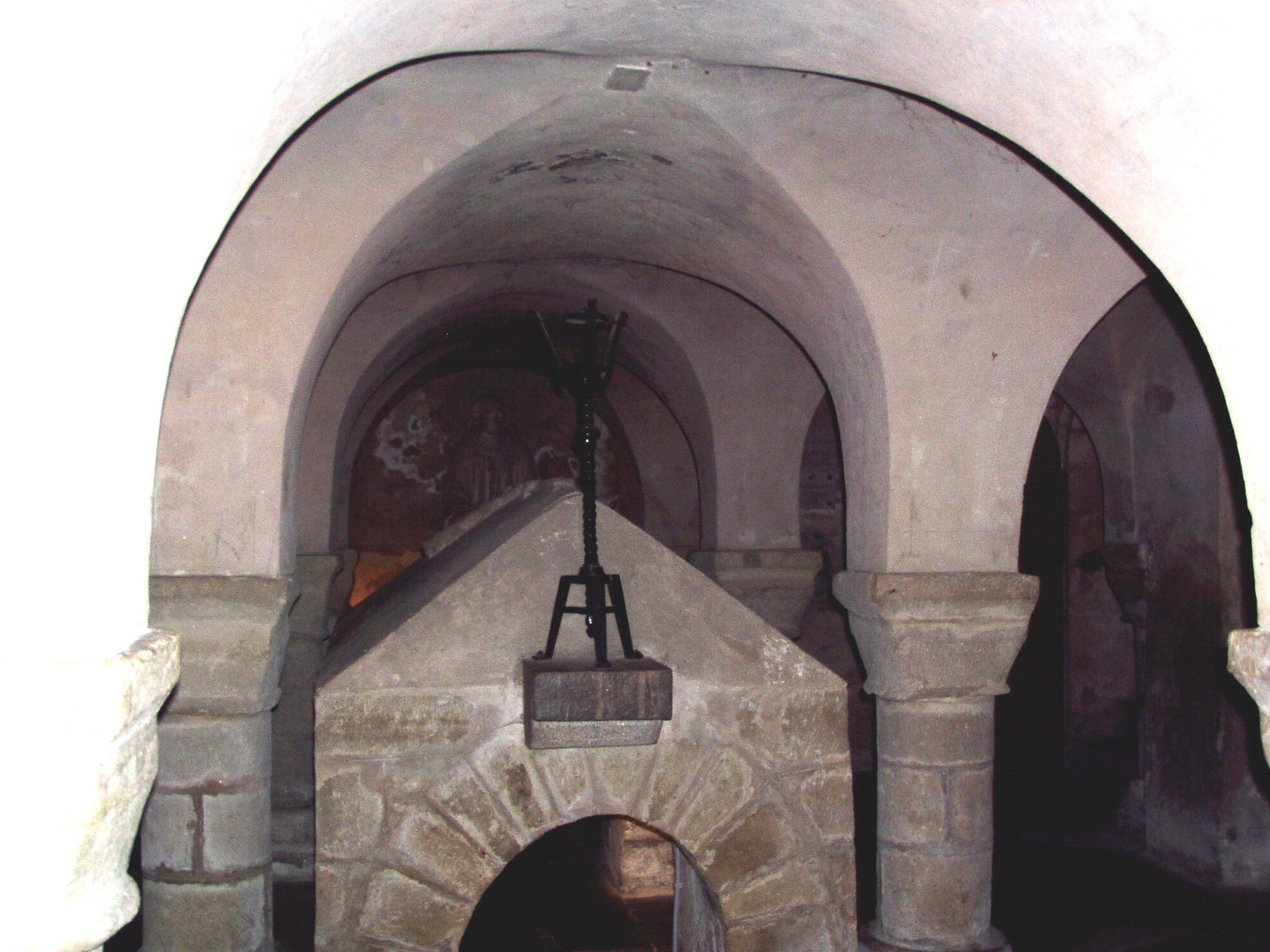 Crypte de l'église Saint-Philbert de Noirmoutier-en-l'Île .